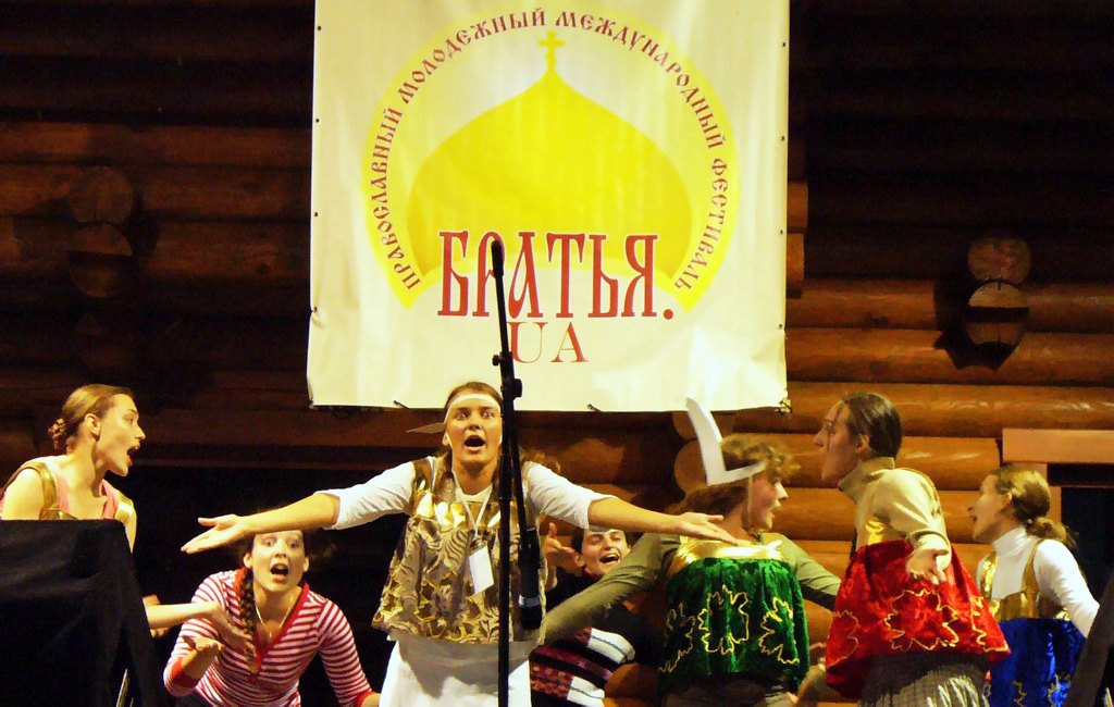 Братья фест Зайцы-Можайцы